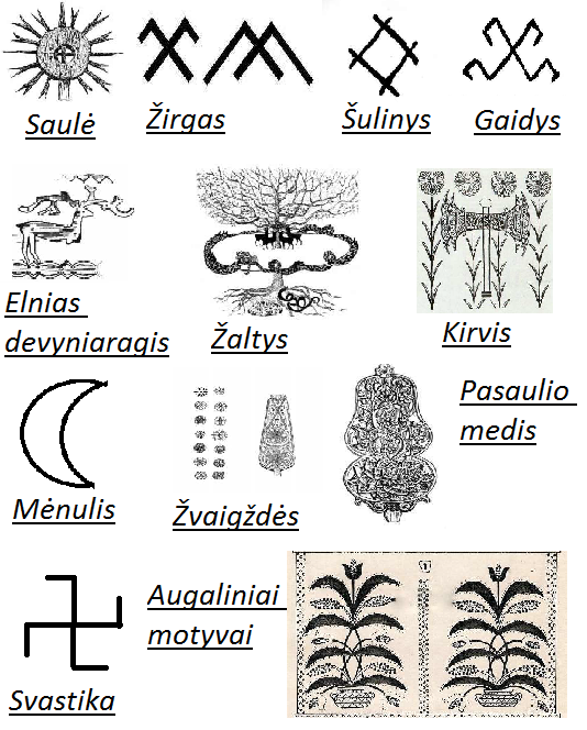 Mitologiniai simboliai